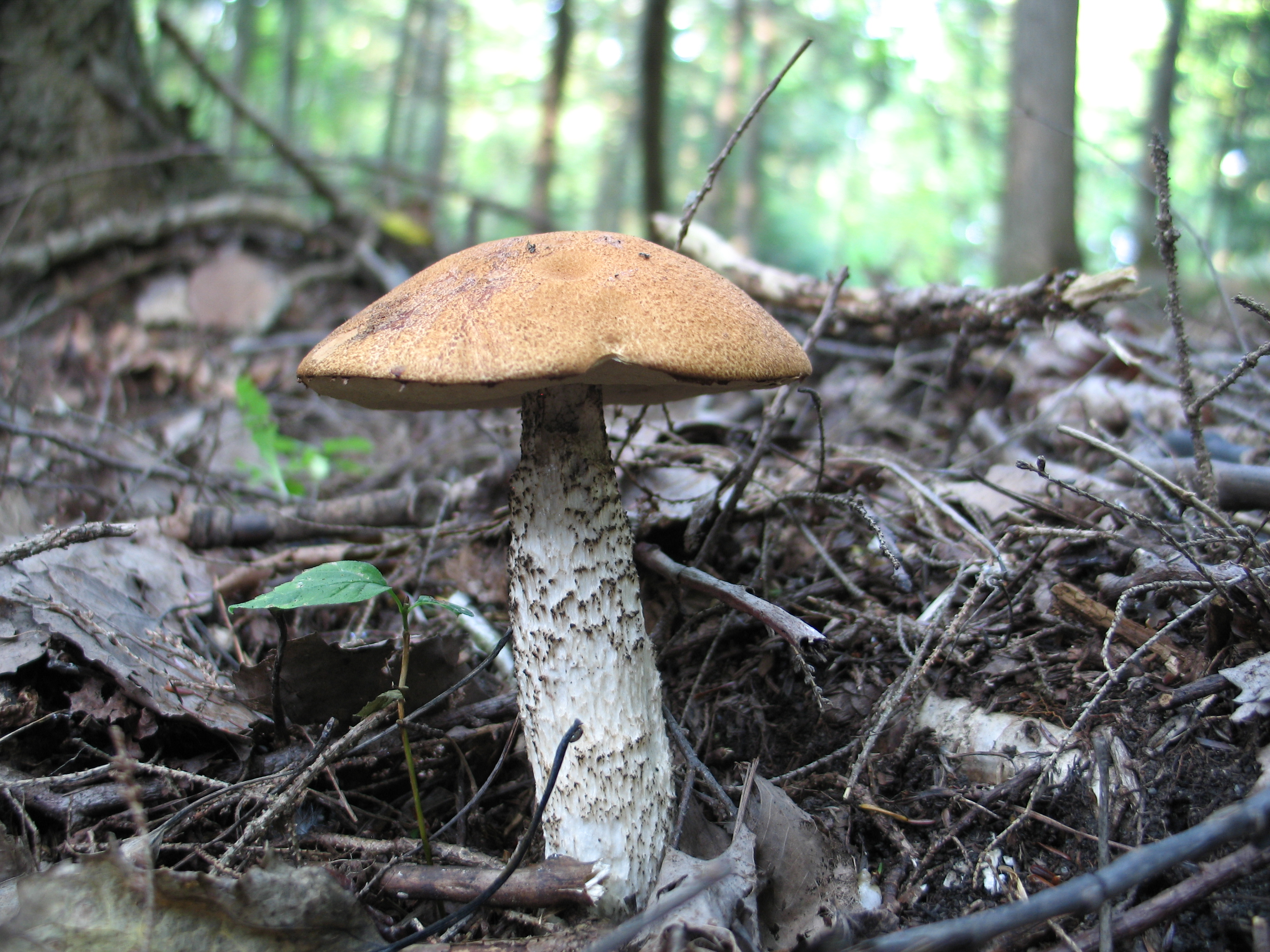 Edible bolete